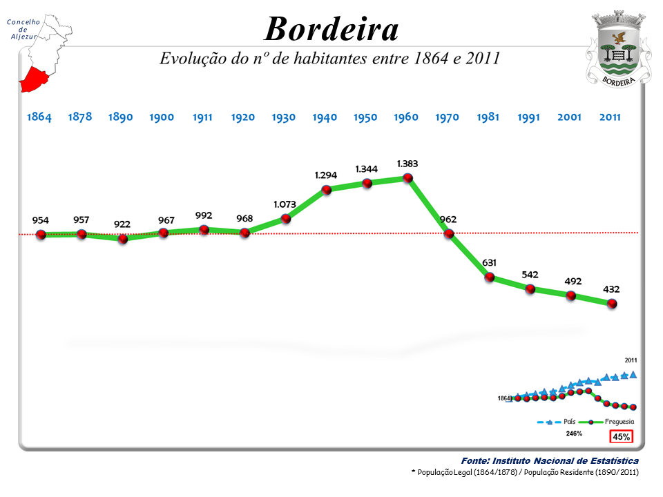 Censos 1864/2011